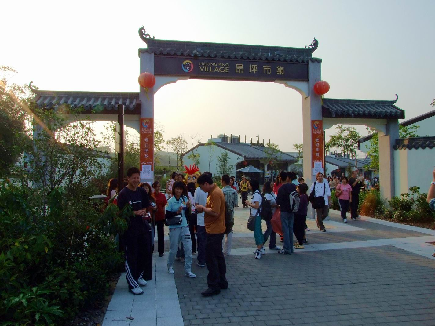 昂坪市集